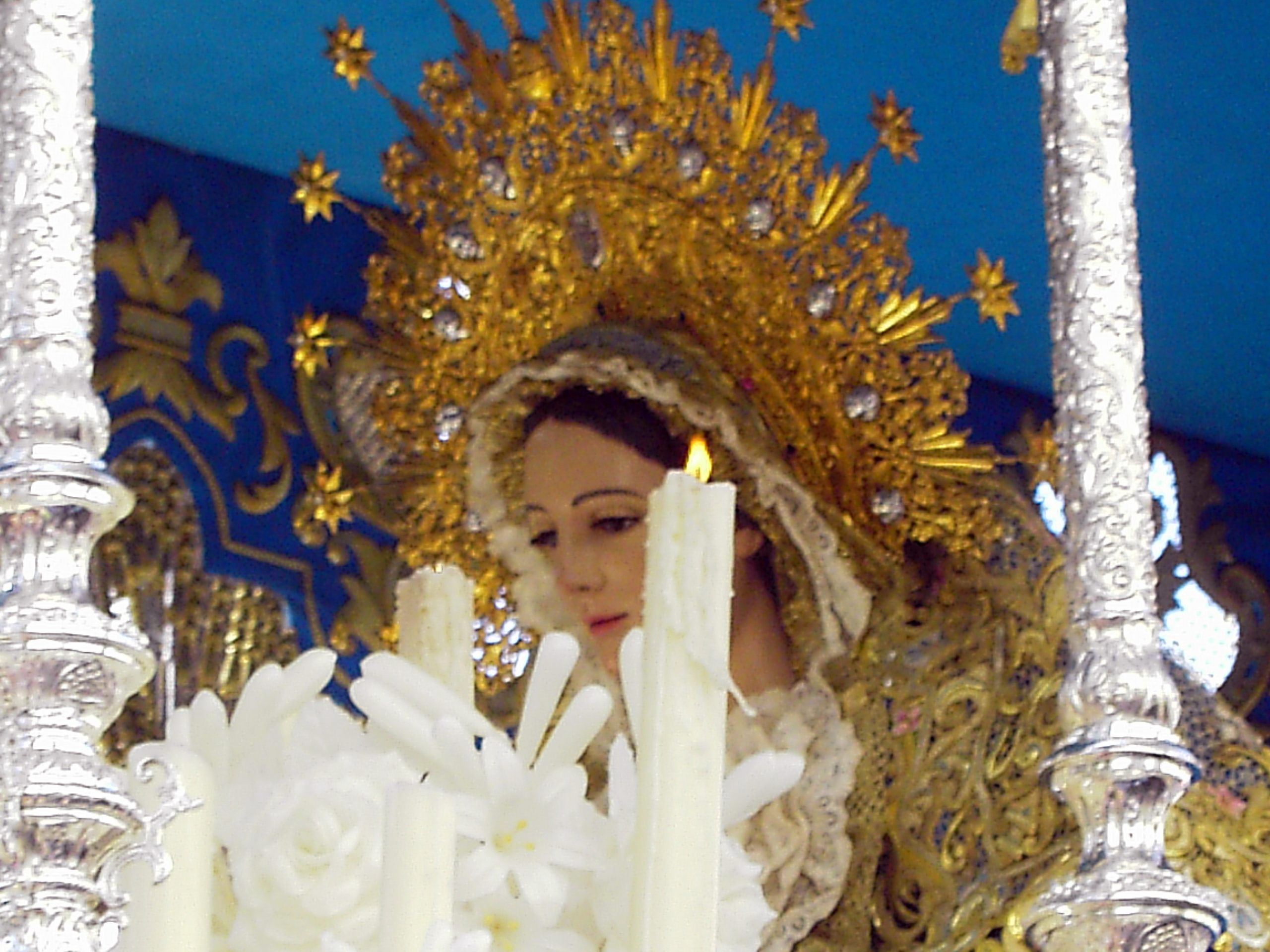 Virgen de los Angeles. Huelva